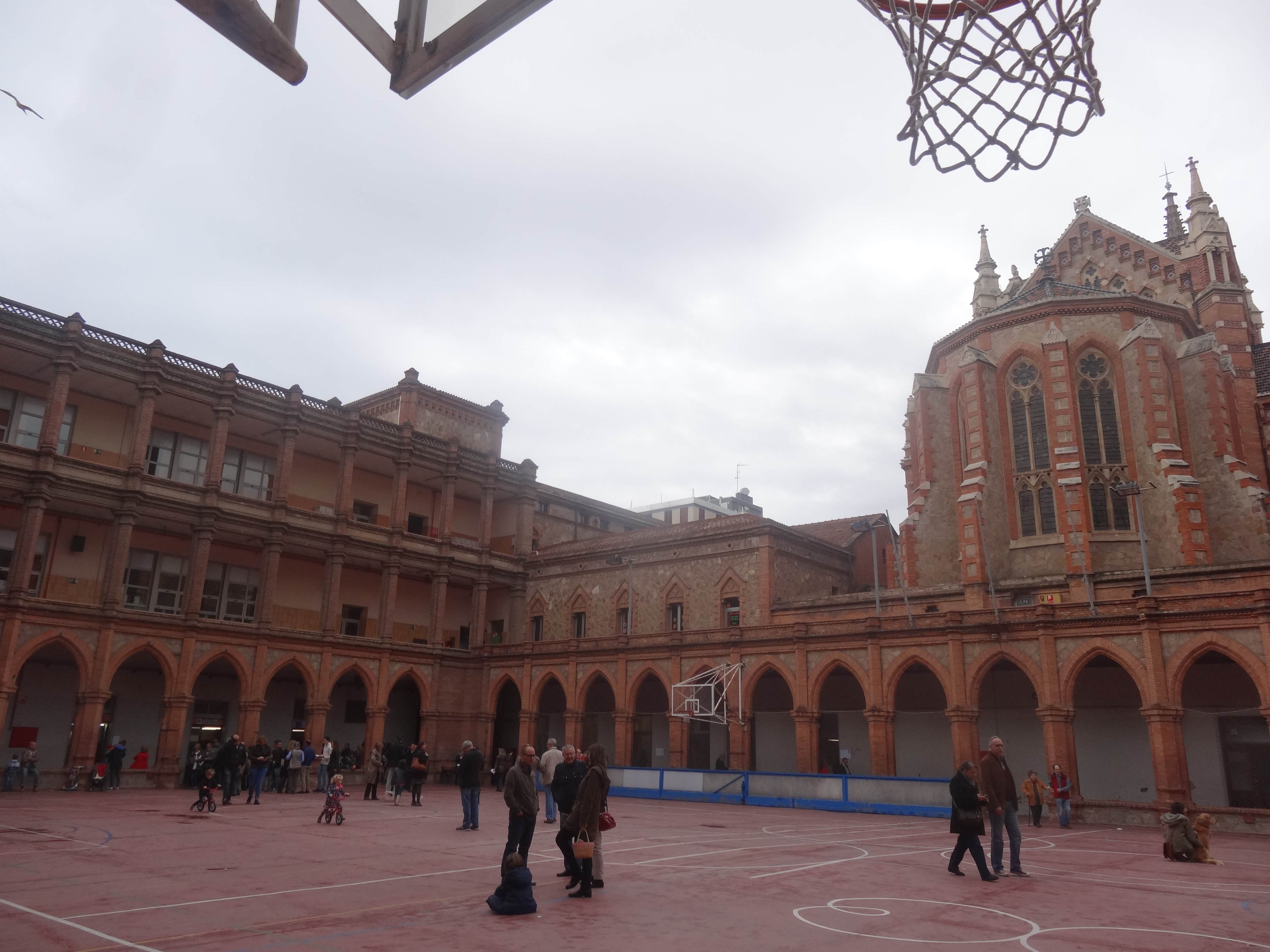 Absis de l'església de Sant Francesc de Sales de Barcelona, vist des del pati de l'escola dels maristes